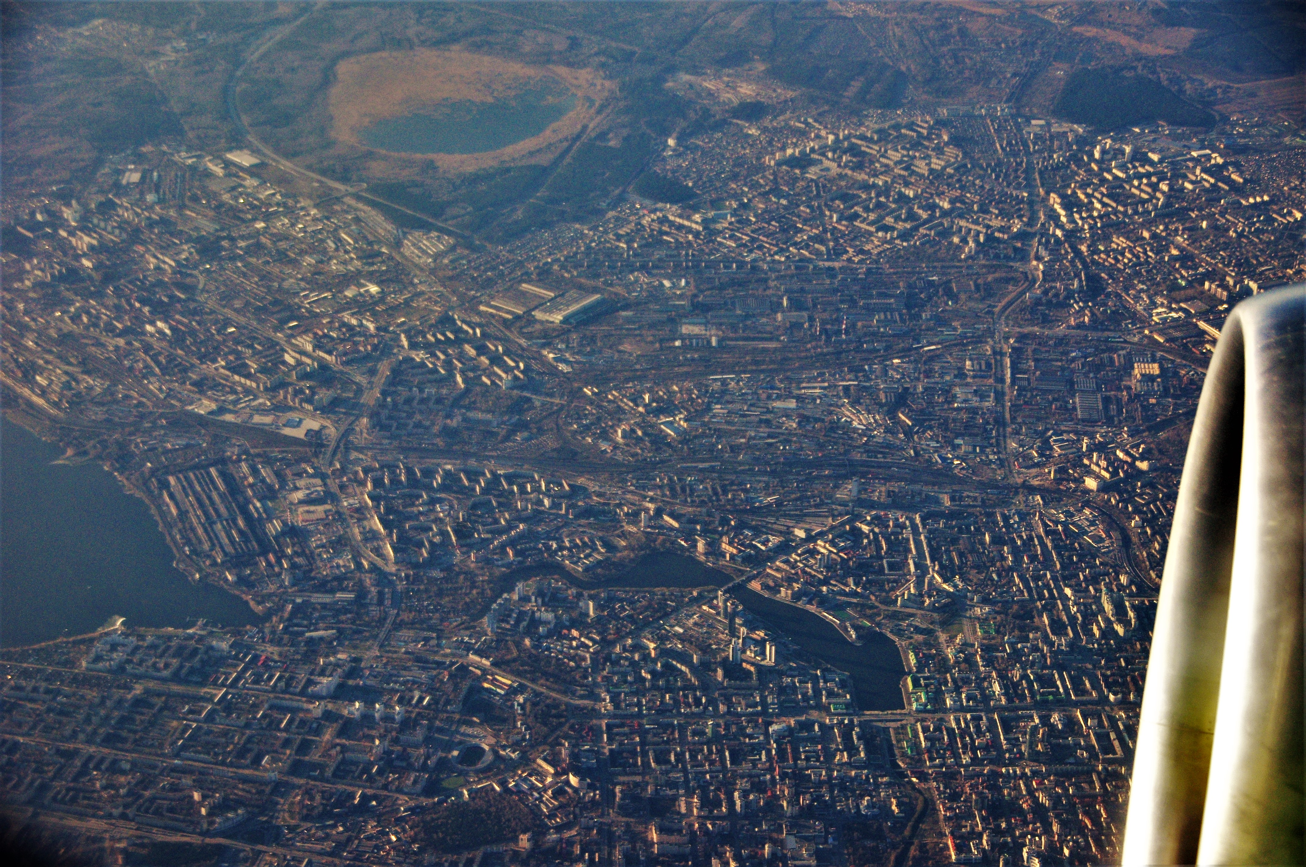 Вид на Екатеринбург из самолёта в Москву